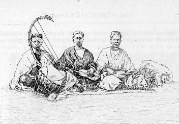 Griots musiciens du haut Sénégal (illustration de Côte occidentale d'Afrique du Colonel Frey) - Fig.80 en tête du chap.IV p.127 - Cote : Réserve A 200 386]